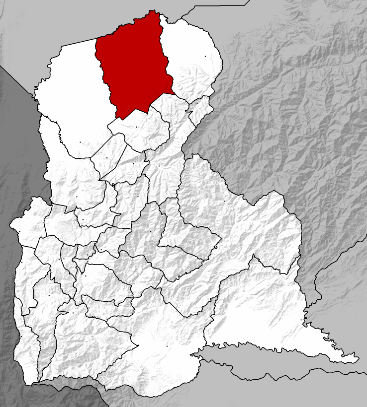 Municipio Panamericano - Táchira